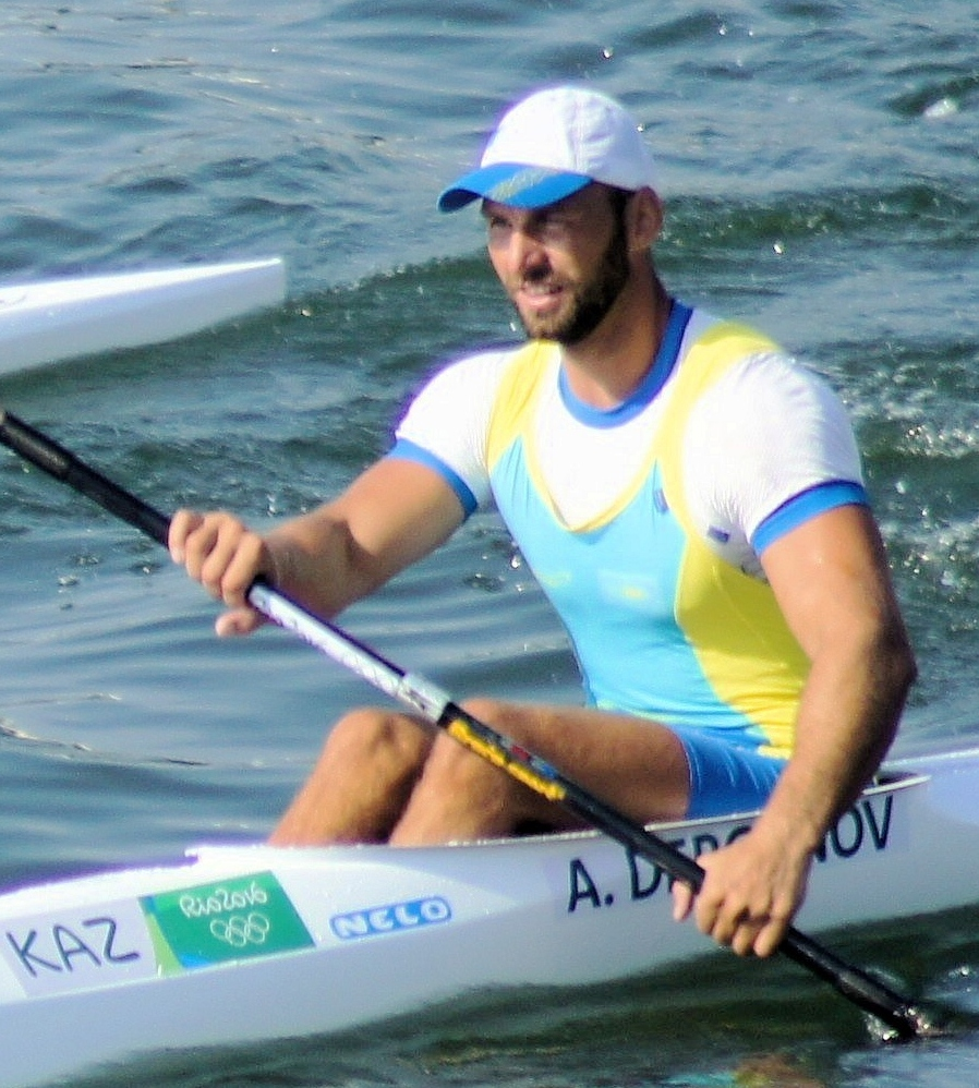 Rio 2016. Canoagem de velocidade/Canoe sprint